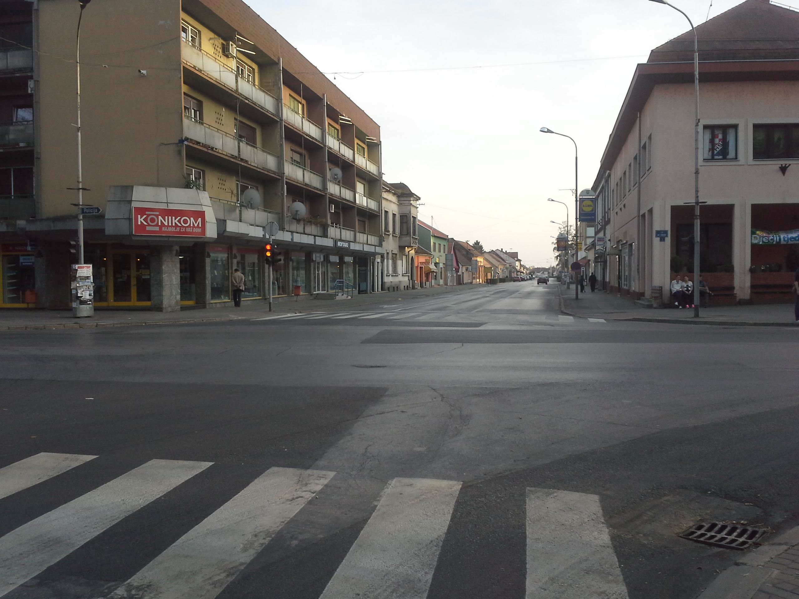 Српски (ћирилица): Donji Miholjac, glavno križanje